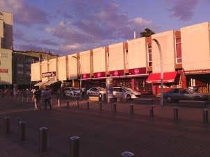 Srpskohrvatski / српскохрватски: Centar grada Podgorice.